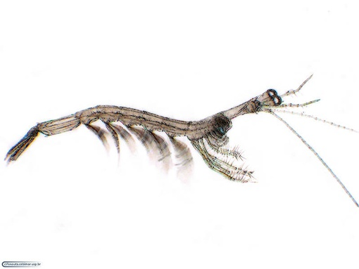 Camarão Luciferidae, superfamilia Sergestoidea